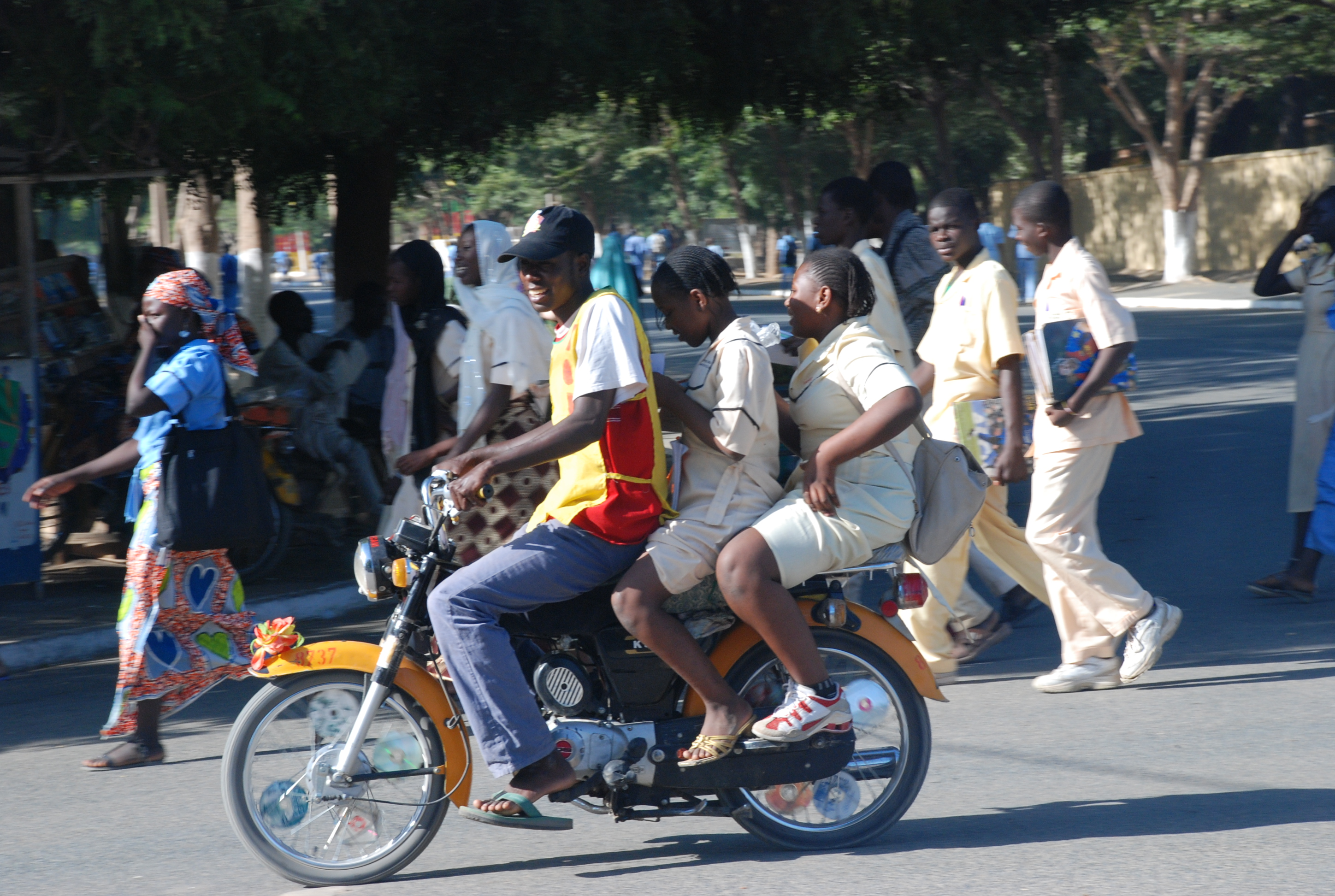 Motos transportant les élèves à la sortie des classes dans la ville de Maroua This is an image with the theme "Africa on the Move or Transport" from: Cameroon